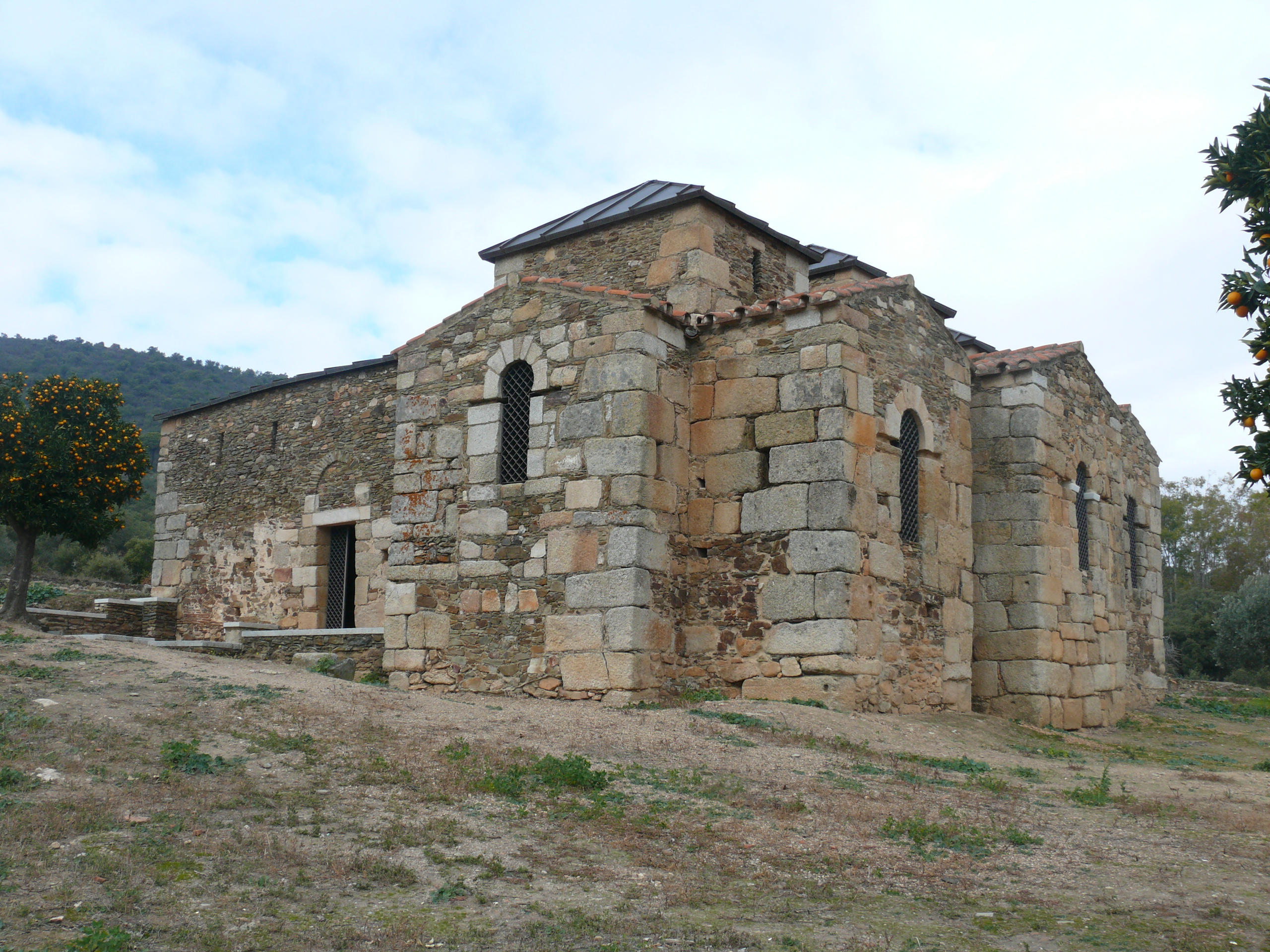 Vista de un lateral de la Basilica de Santa Lucía del Trampal.